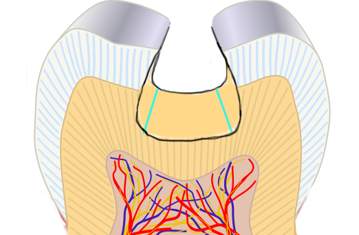 Cavity